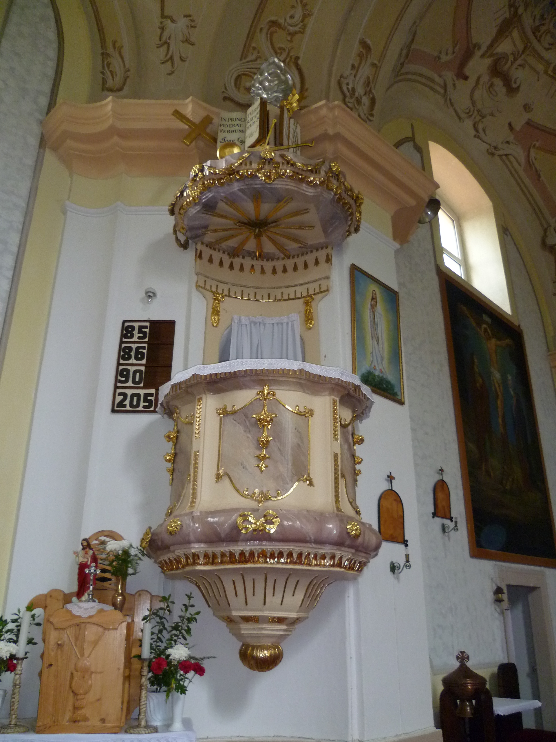 Szószék a bánhorváti templomban.